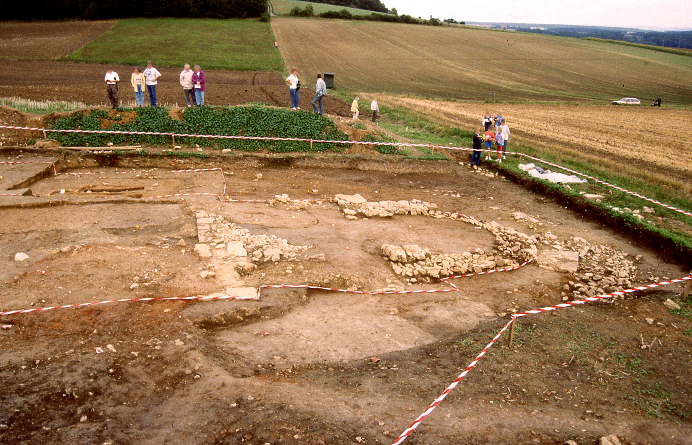 Ausgrabung an der Wüstungskirche Vriemeensen bei Meensen, Gemeinde Scheden, Südniedersachsen. Tag des offenen Denkmals 1995 Scan vom Diapositiv